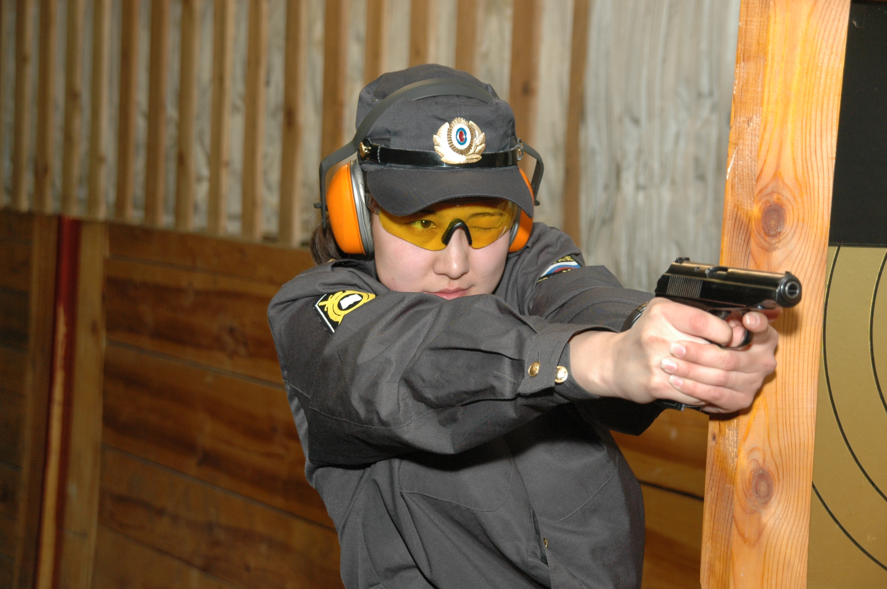 Огневая подготовка